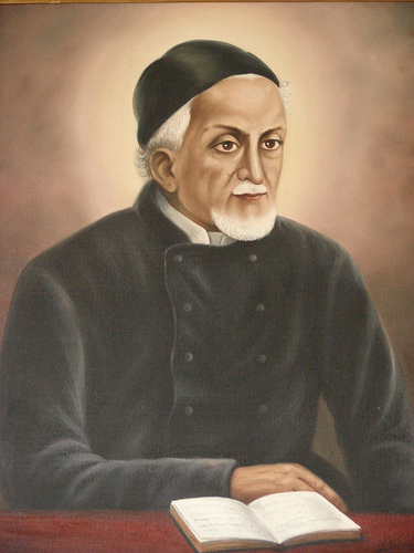 Fotografía tomada a un cuadro de San Gaspar(n. Verona, Italia, 9 de octubre de 1777 - m. 12 de junio de 1853) (autor del cuadro: desconocido)